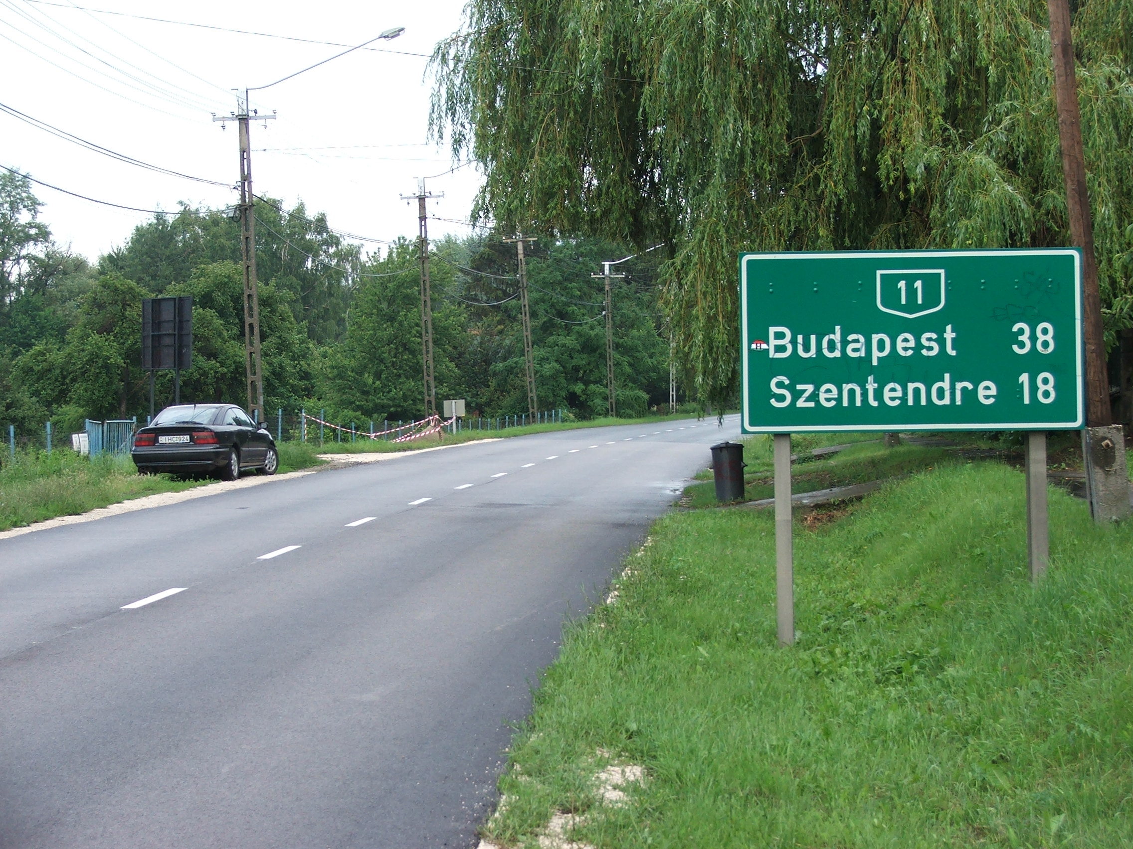 Dunabogdányi út